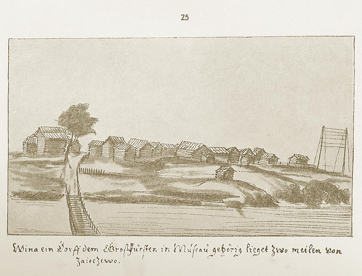 Вина